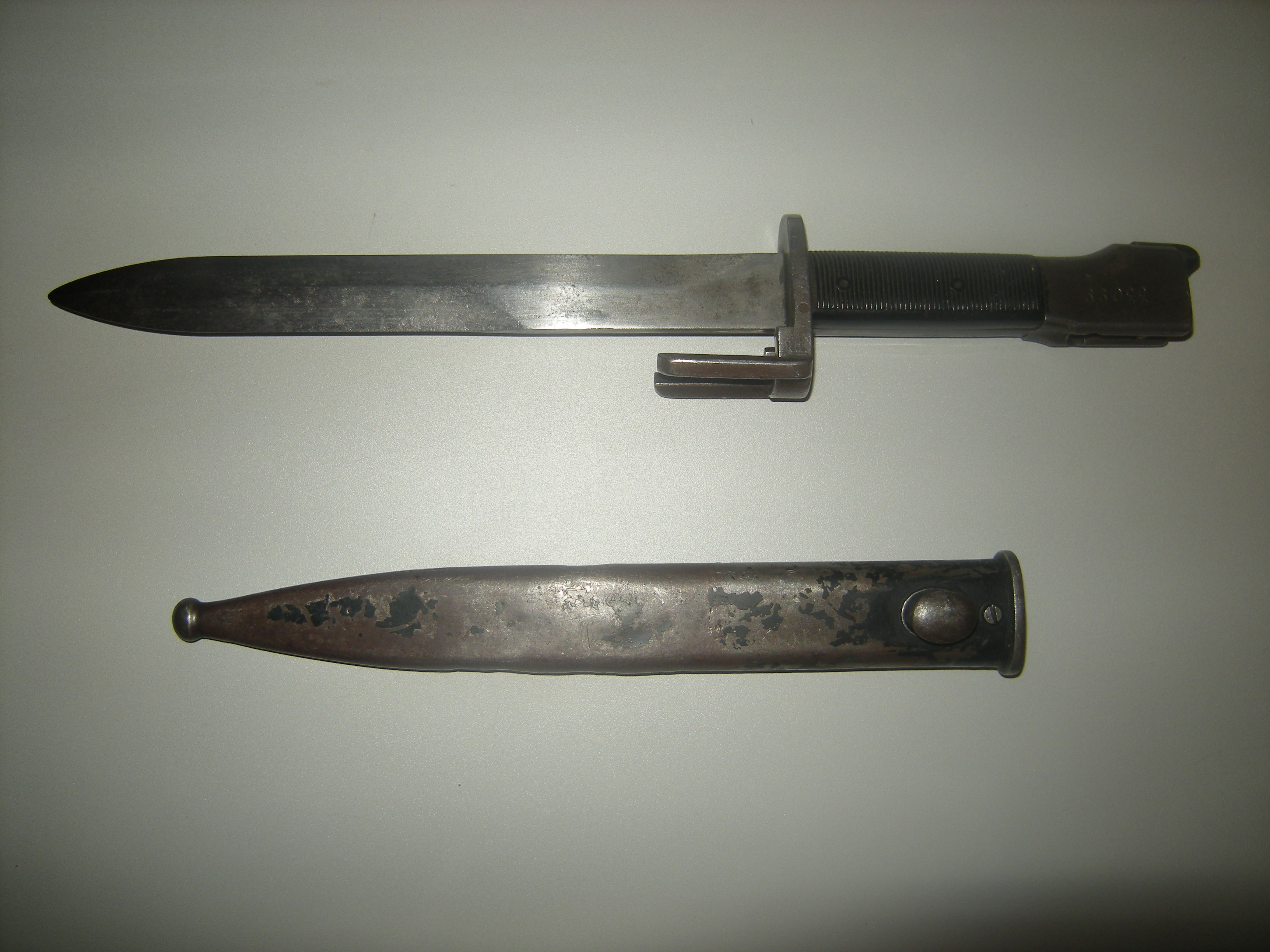 Bayoneta del fusil de asalto FAL